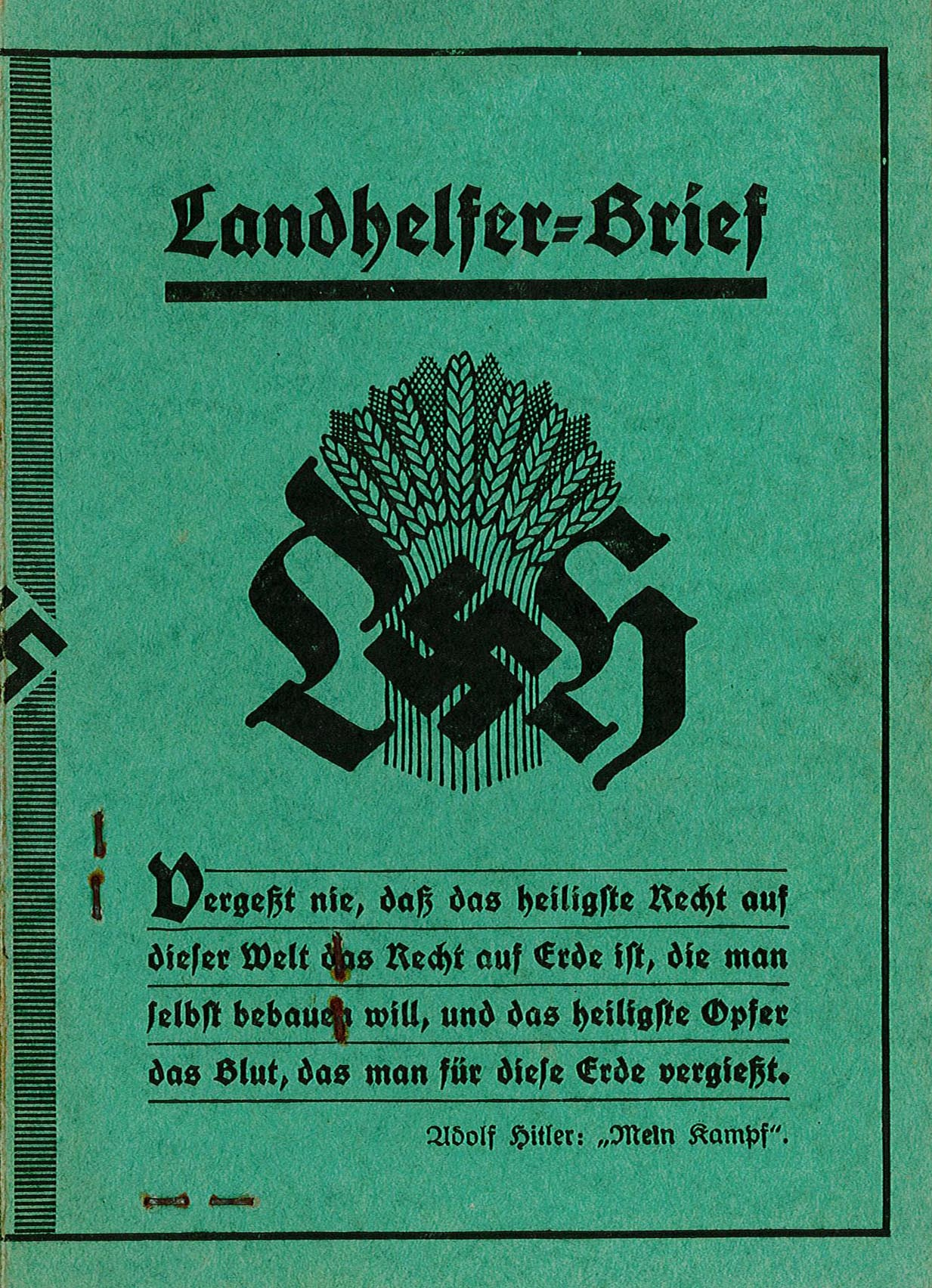 Landhelferbrief